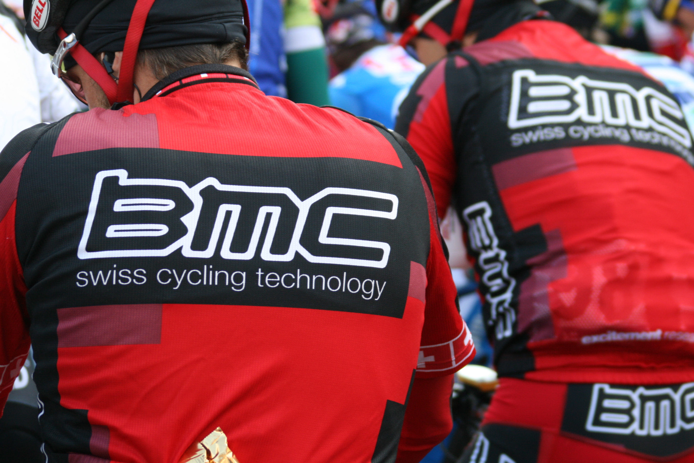 Deux coureurs de l'équipe BMC Racing Team lors des Trois jours de Flandre occidentale 2010, à Torhout